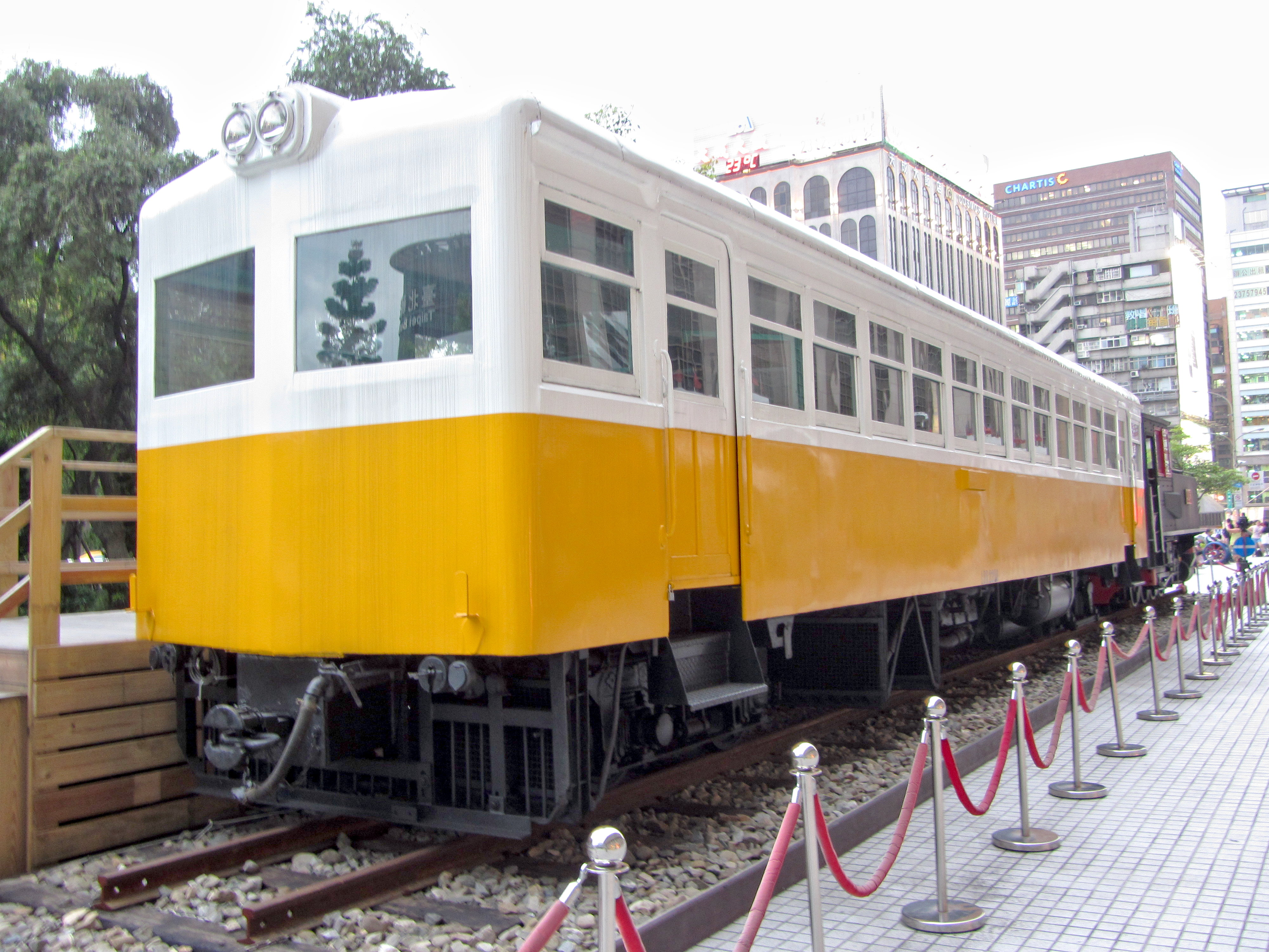 臺灣鐵路管理局柴油客車LDR2201靜態保存於臺北車站東門。